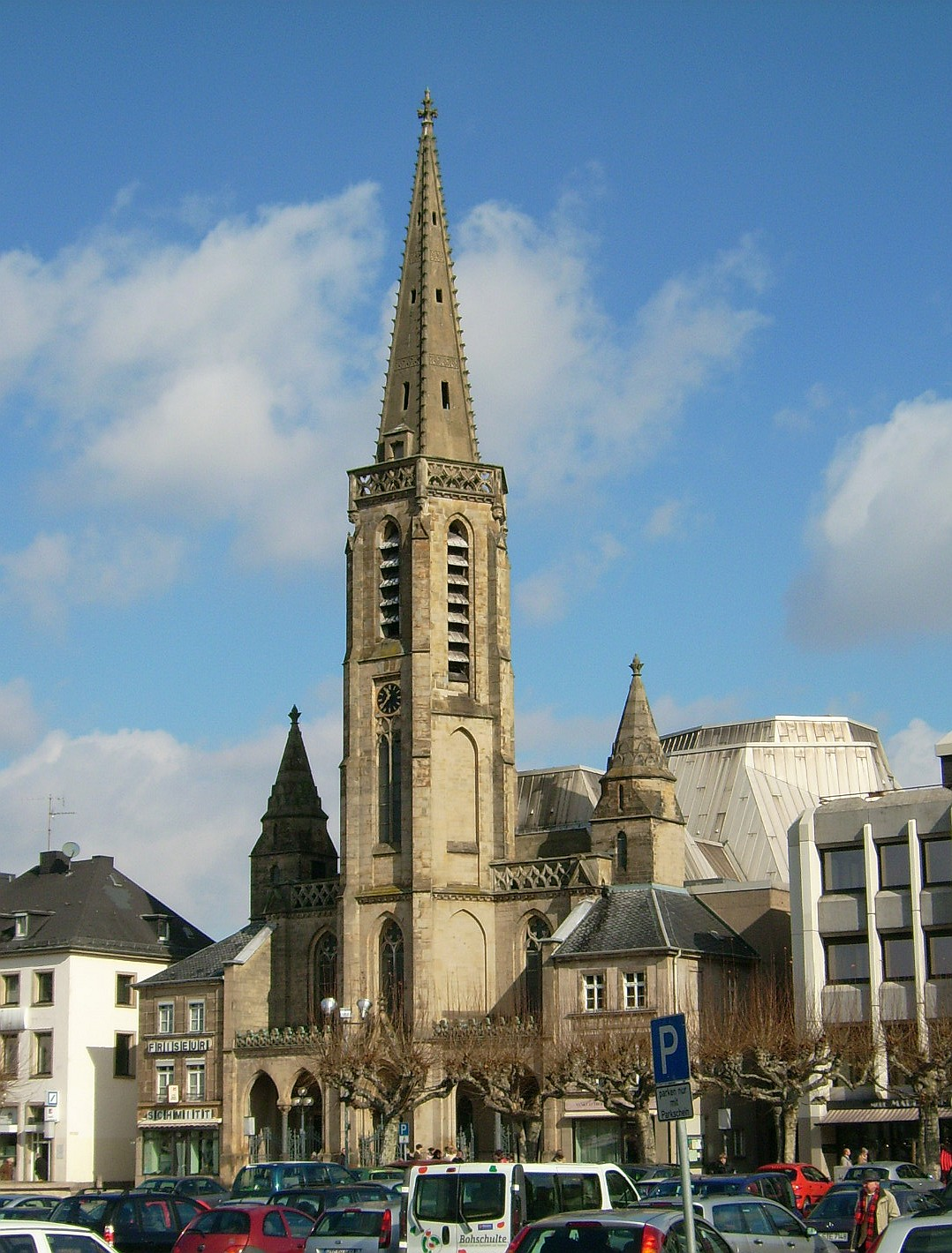 Bildbeschreibung: Ludwigskirche Saarlouis Quelle: selbst fotografiert Fotograf: Lokilech Datum: siehe Metadaten